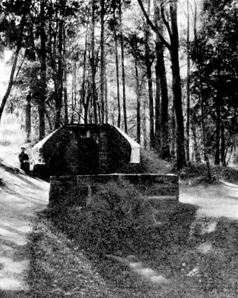 Начало открытой части Баболовского водопровода. Фотография, 1900